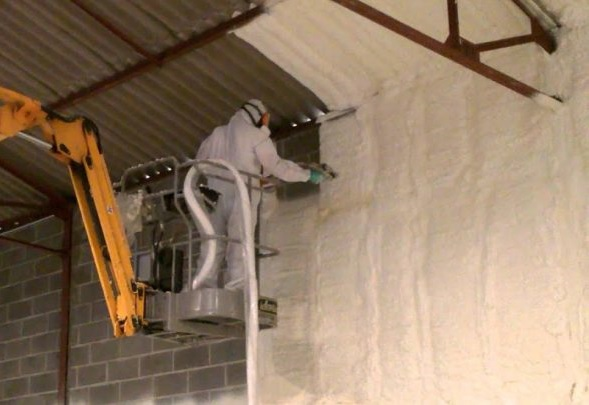 Hombre proyectando espuma de poliuretano en las paredes y techos de una nave industrial.